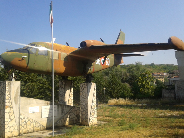 Monumento dedicato all'aviatore Alfredo Barbati